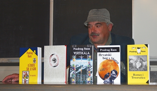 Predrag Raos na SFeraKonu u Zagrebu